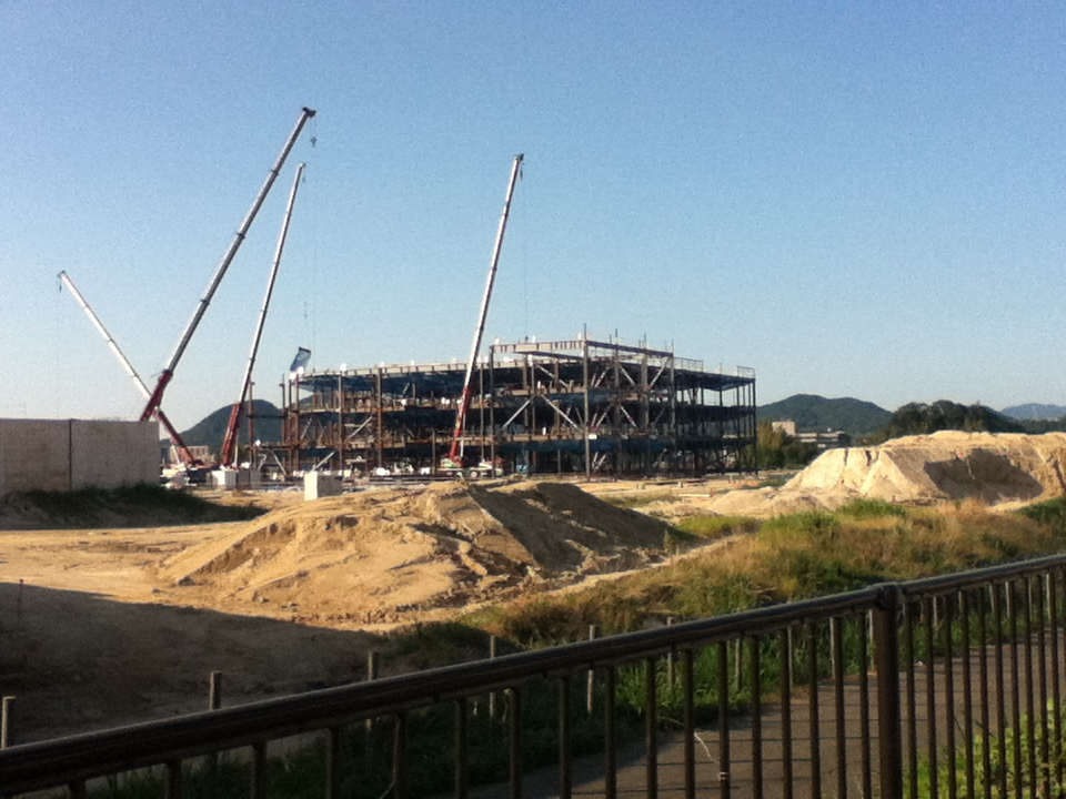 ９月１５日、イオンモール福津の工事現在情報